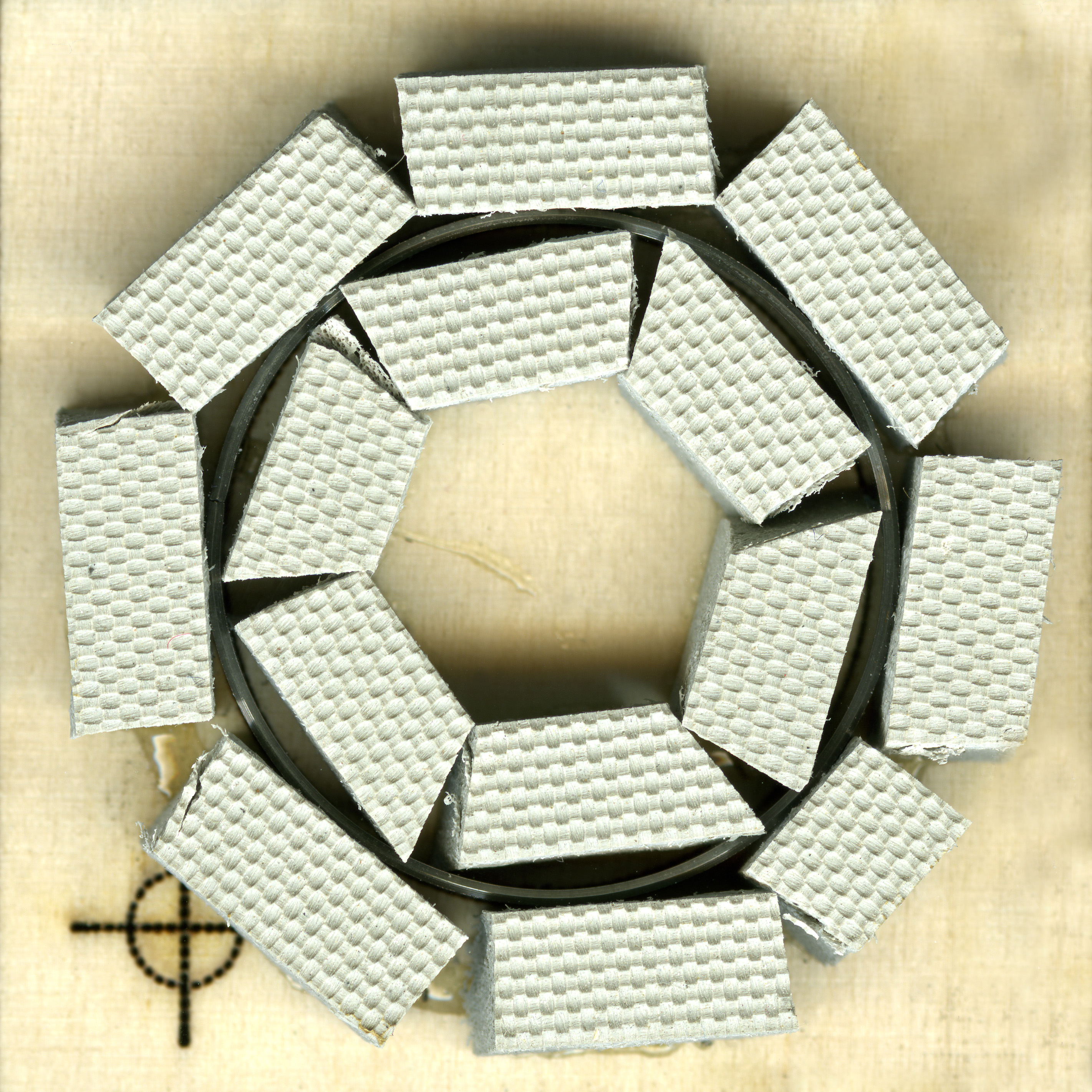 Original Stanzform für die Karton-Stanzung eines Kreises im Durchmesser von 3 cm